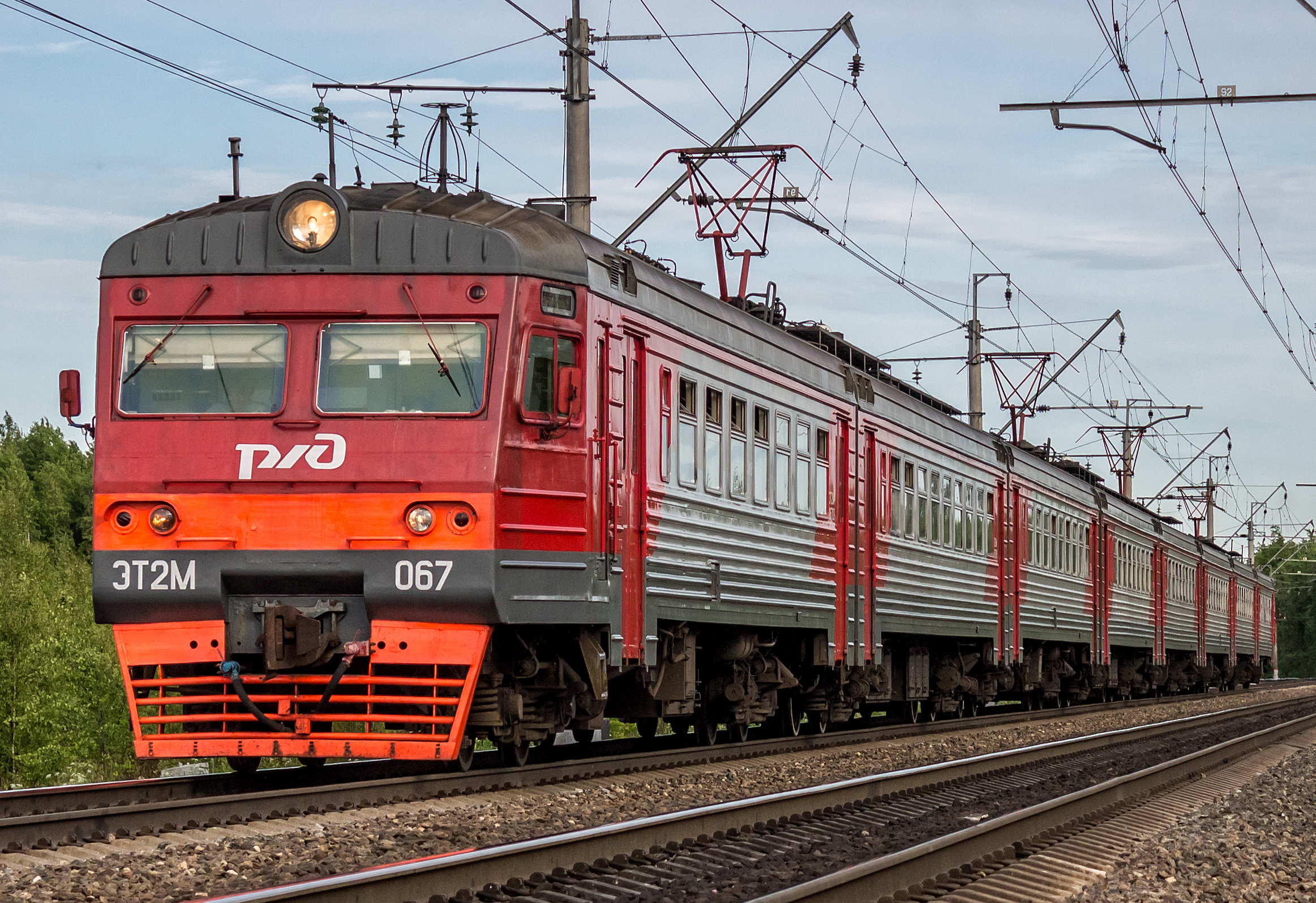 ЭТ2М-067, Пелла - Сапёрная см. фото 694252 в альбоме автора